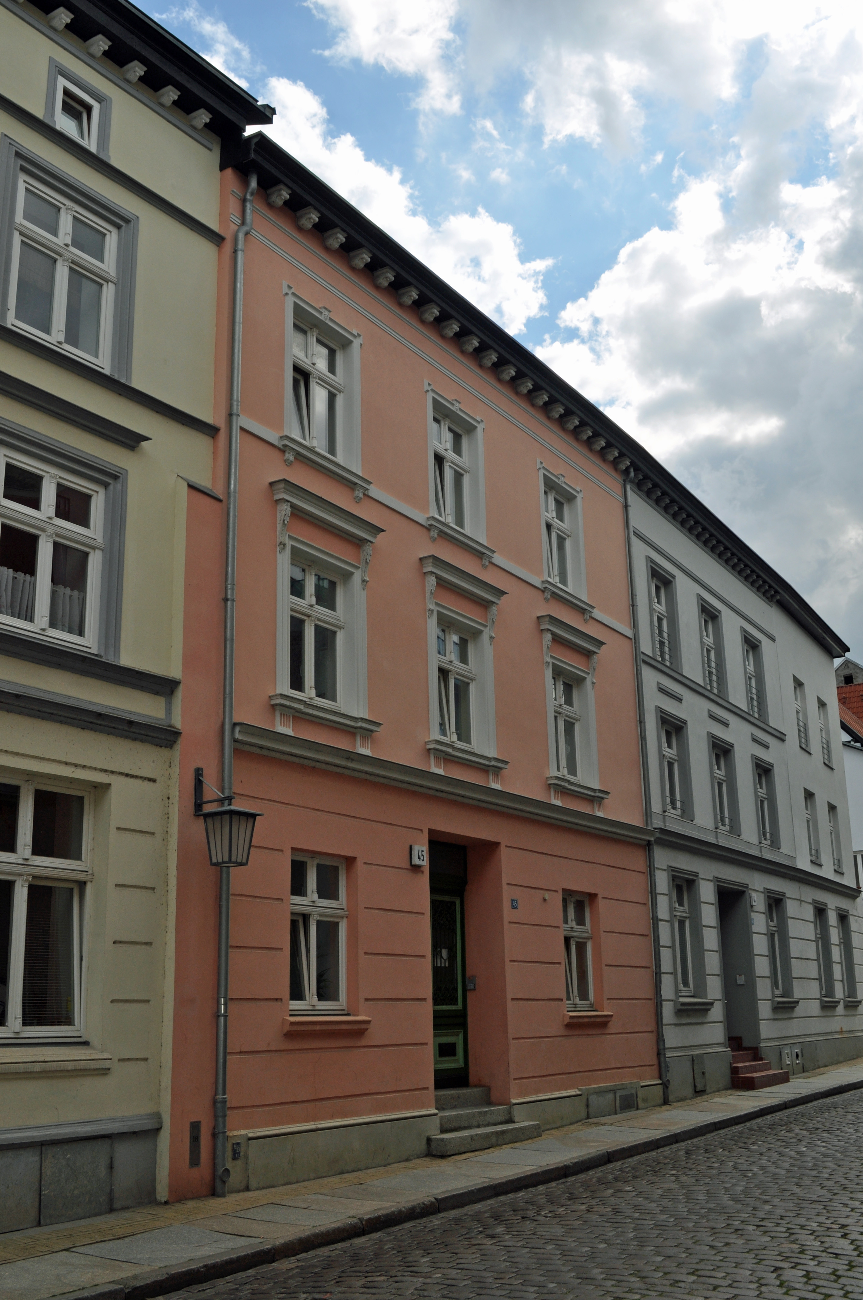 Das Foto zeigt ein Haus (bzw. Details des Hauses) in der Frankenstraße in Stralsund, Deutschland. Die Hausnummer steht im Dateinamen. Aufgenommen am 19. Juli 2011 vom Benutzer:Klugschnacker.